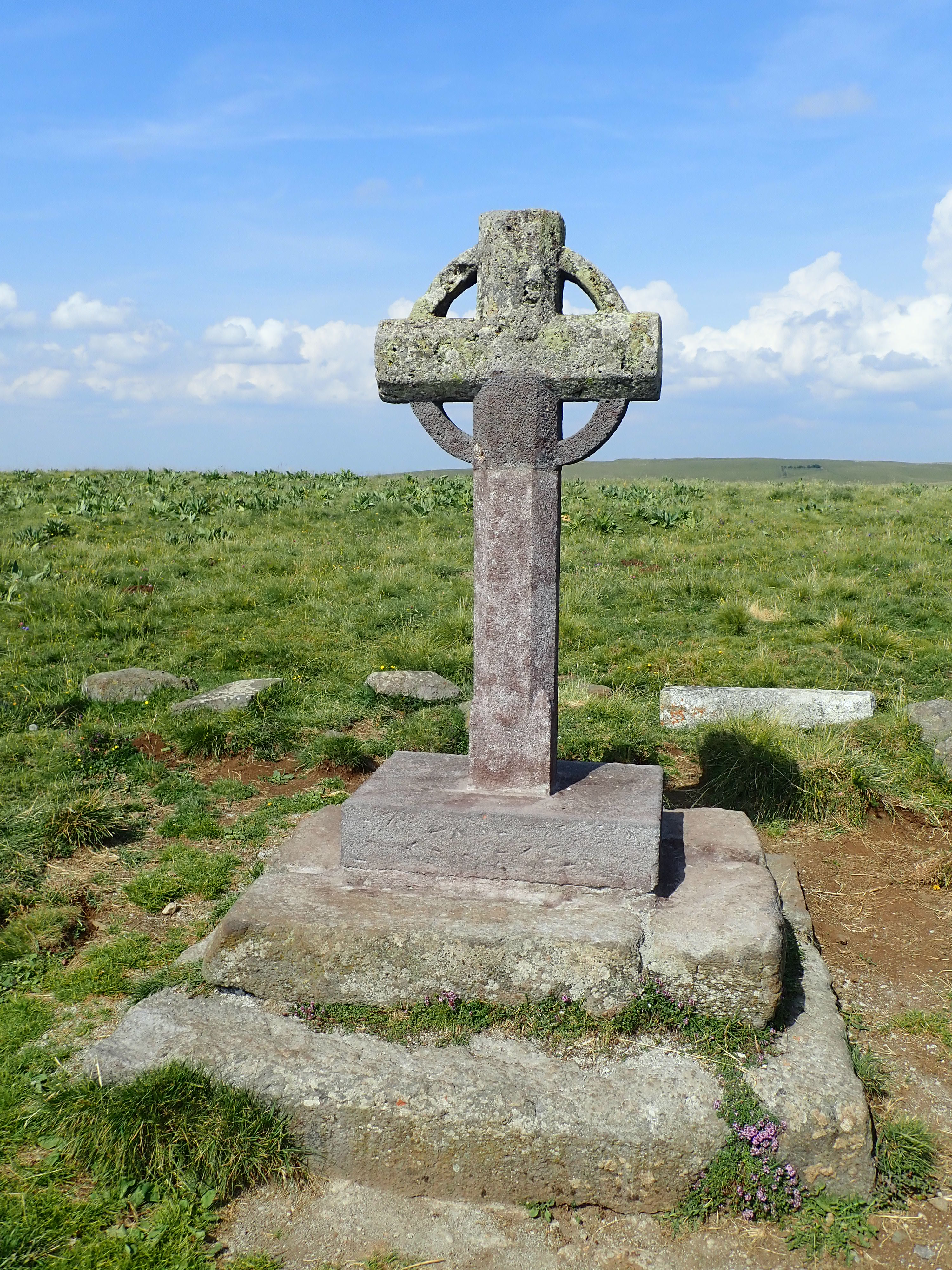 La croix de la Rode (monts d'Aubrac) après sa restauration en 2019.